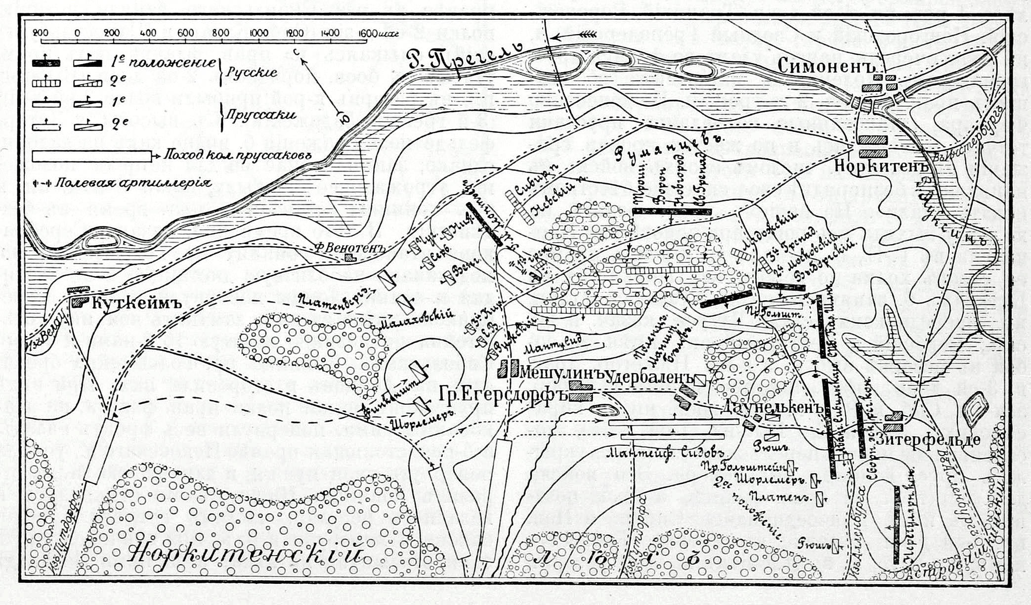 Это изо было использовано в статье «Гросс-Егерсдорф» опубликованной в восьмом томе «Военной энциклопедии», который был издан книгоиздательским товариществом И. Д. Сытина в 1912 году в столице Российской империи городе Санкт-Петербурге.